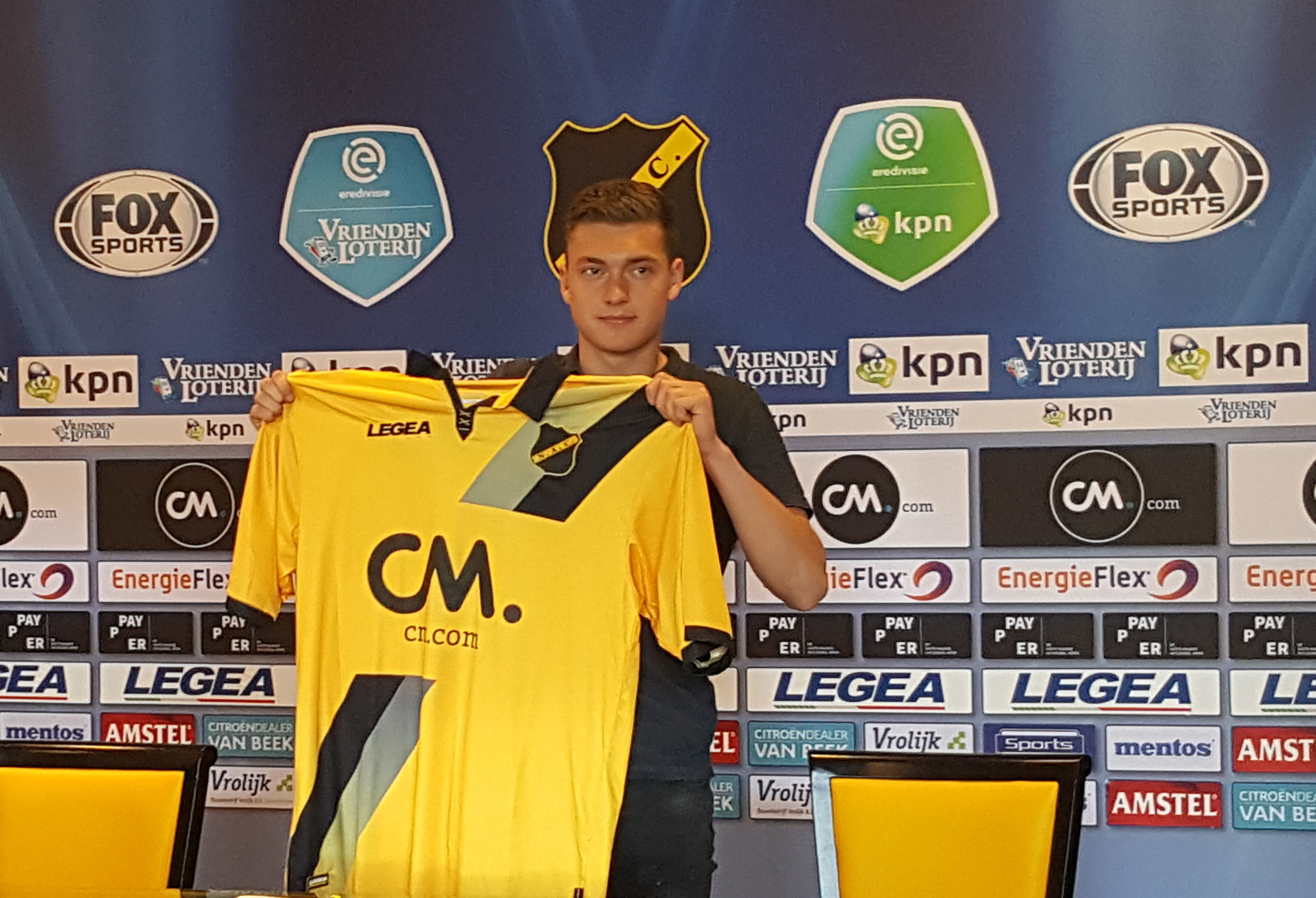 Diego Snepvangers